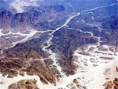 Beispiel für Luftbildfotografie: Aufnahme der Sahara - Fotografie von Agon S. Buchholz, 21. September 2003 - mit Minolta Dimage 7Hi. Diese Abbildung wird hiermit der Wikipedia unter der GNU FDL übergeben.